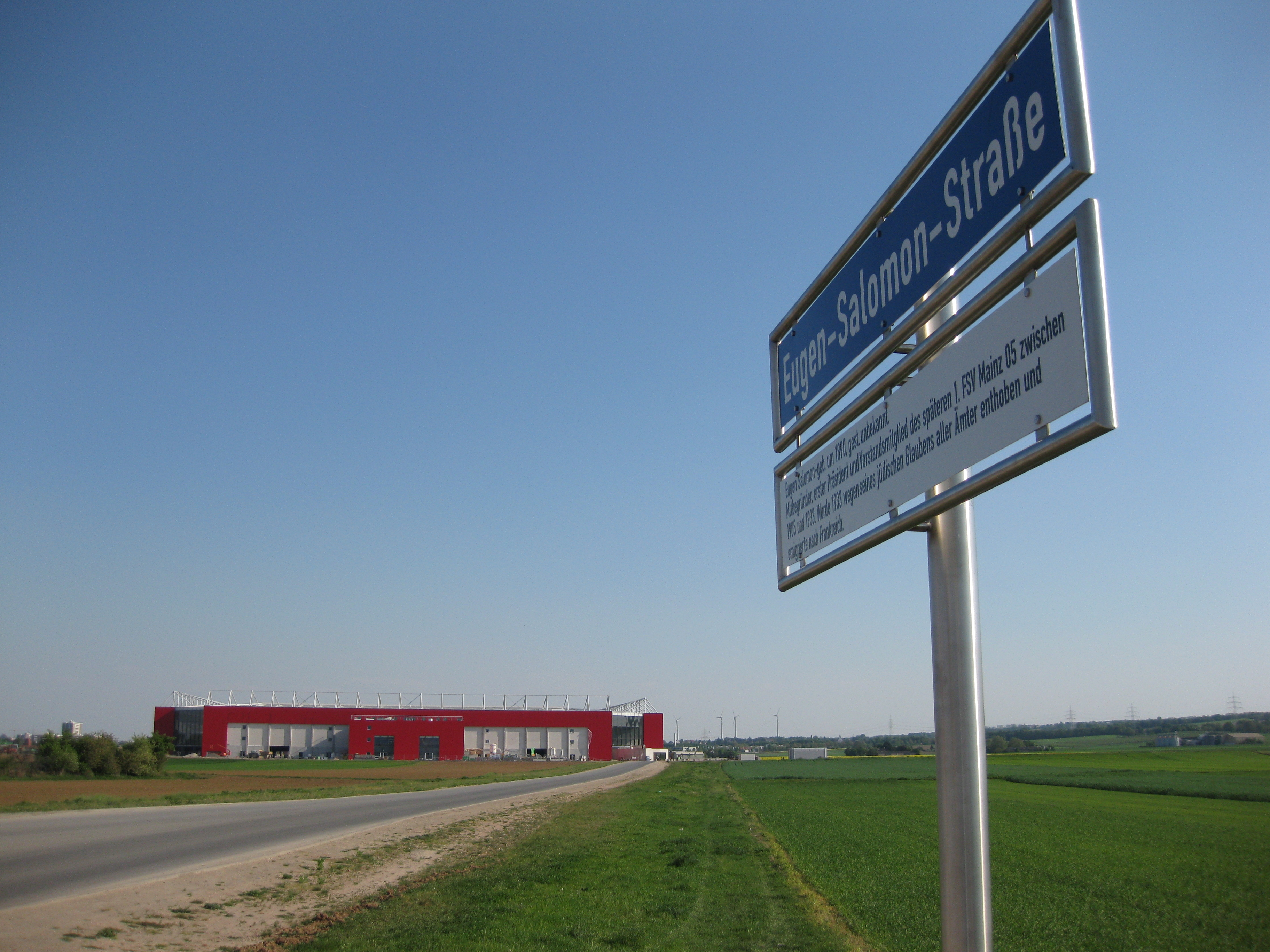 Straßenschild Eugen-Salomon-Straße (Mainz-Bretzenheim), im Hintergrund: Coface-Arena des Bundesligisten 1. FSV Mainz 05